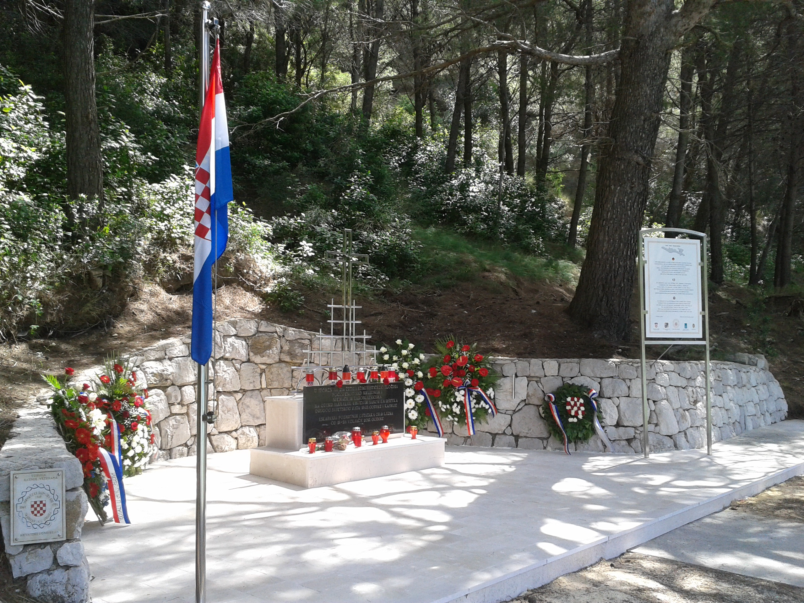 Spomenik hrvatskim i njemačkim vojnicima pogubljenima na Jakljanu 1945. godine nakon kraja Drugog svjetskog rata